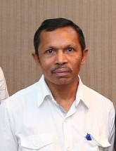 José António de Jesus das Neves Tetun: Florentina da Conceição Pereira Martins Smith